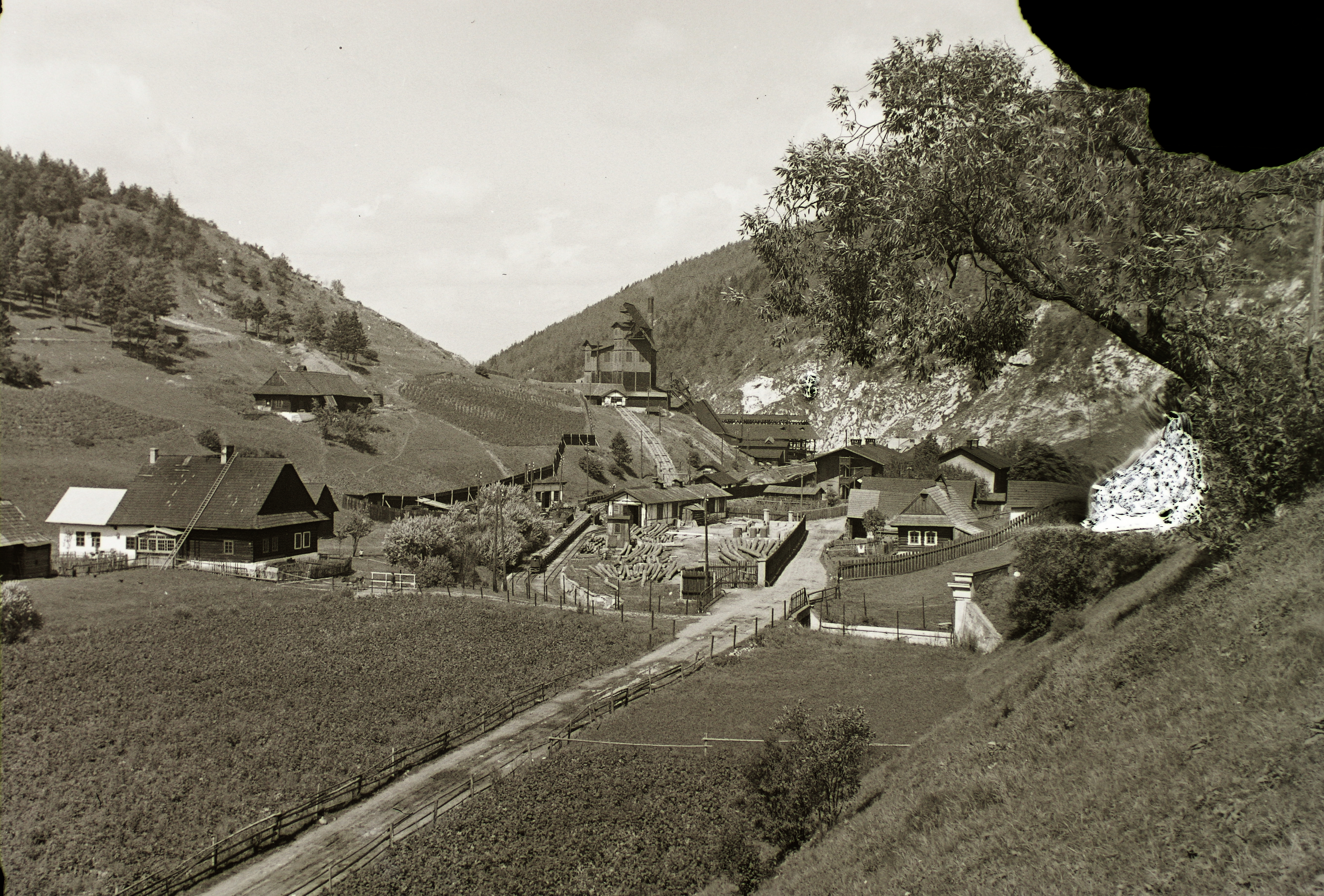 vasércosztályozó. Location: Slovakia, Rudňany Title: vasércosztályozó.